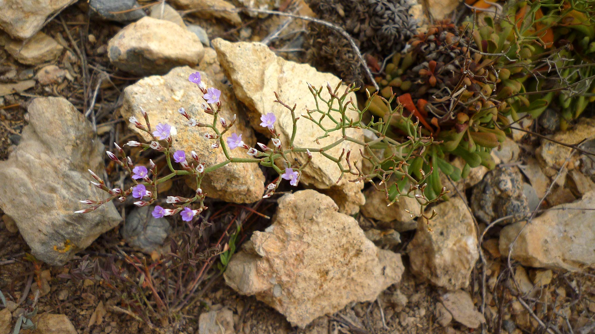 Limonium carthaginense. Endemismo de las sierras de Cartagena.